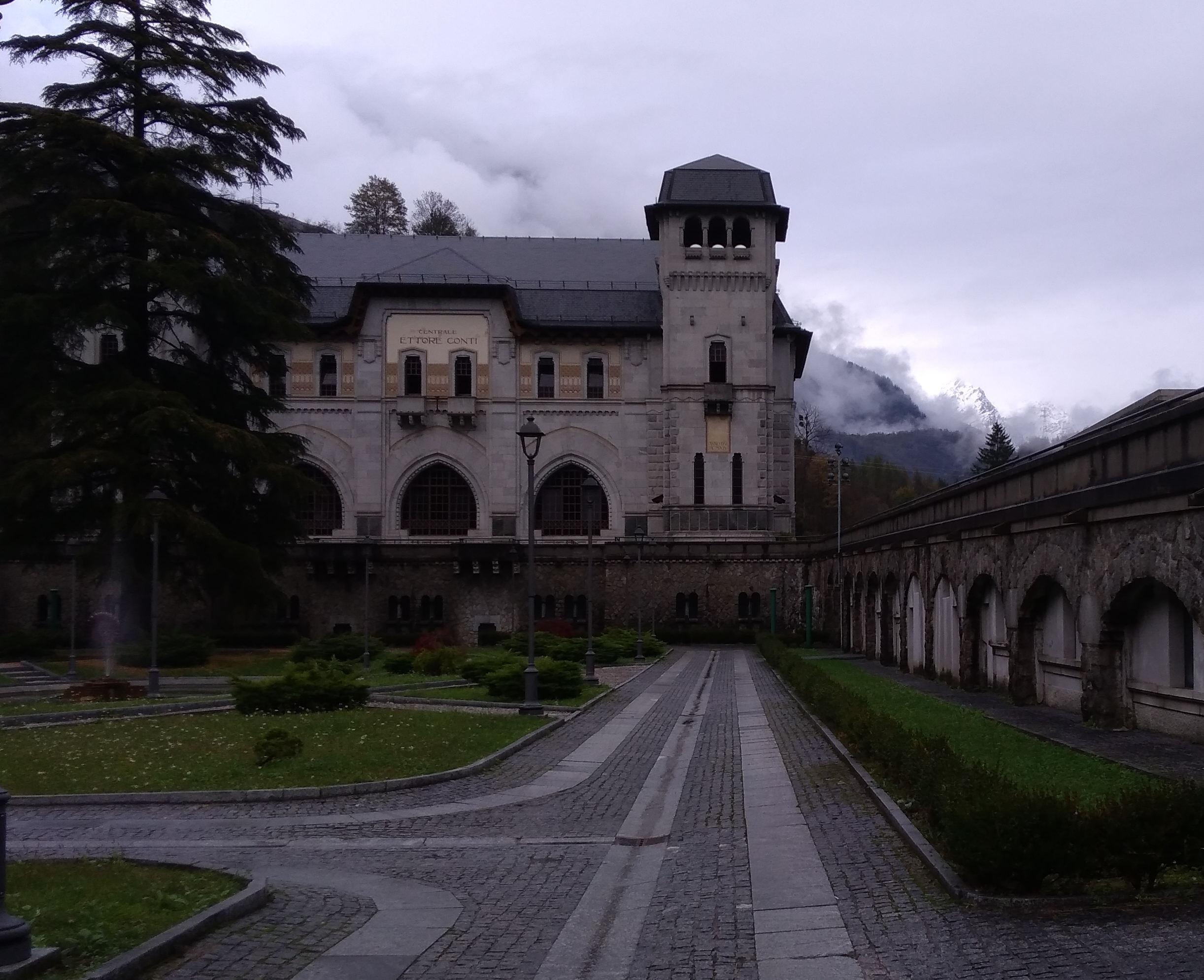 Centrale idroelettrica di Verampio - Crodo